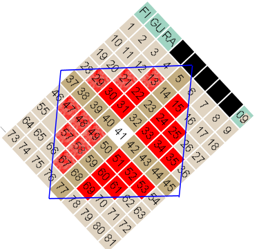 Muestra como rellenar las casillas diagonales de un cuadrado mágico esotérico de lado impar sin necesidad de calcularlas.